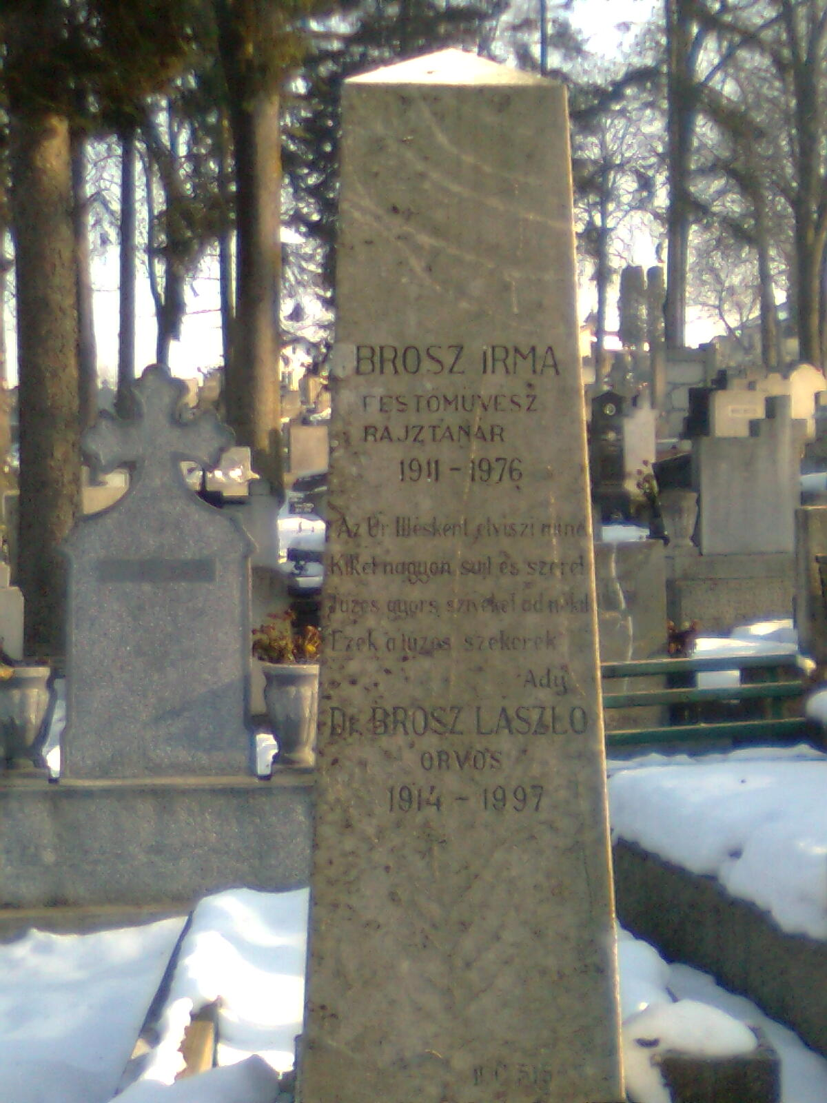 Brósz Irma festőművész sírja